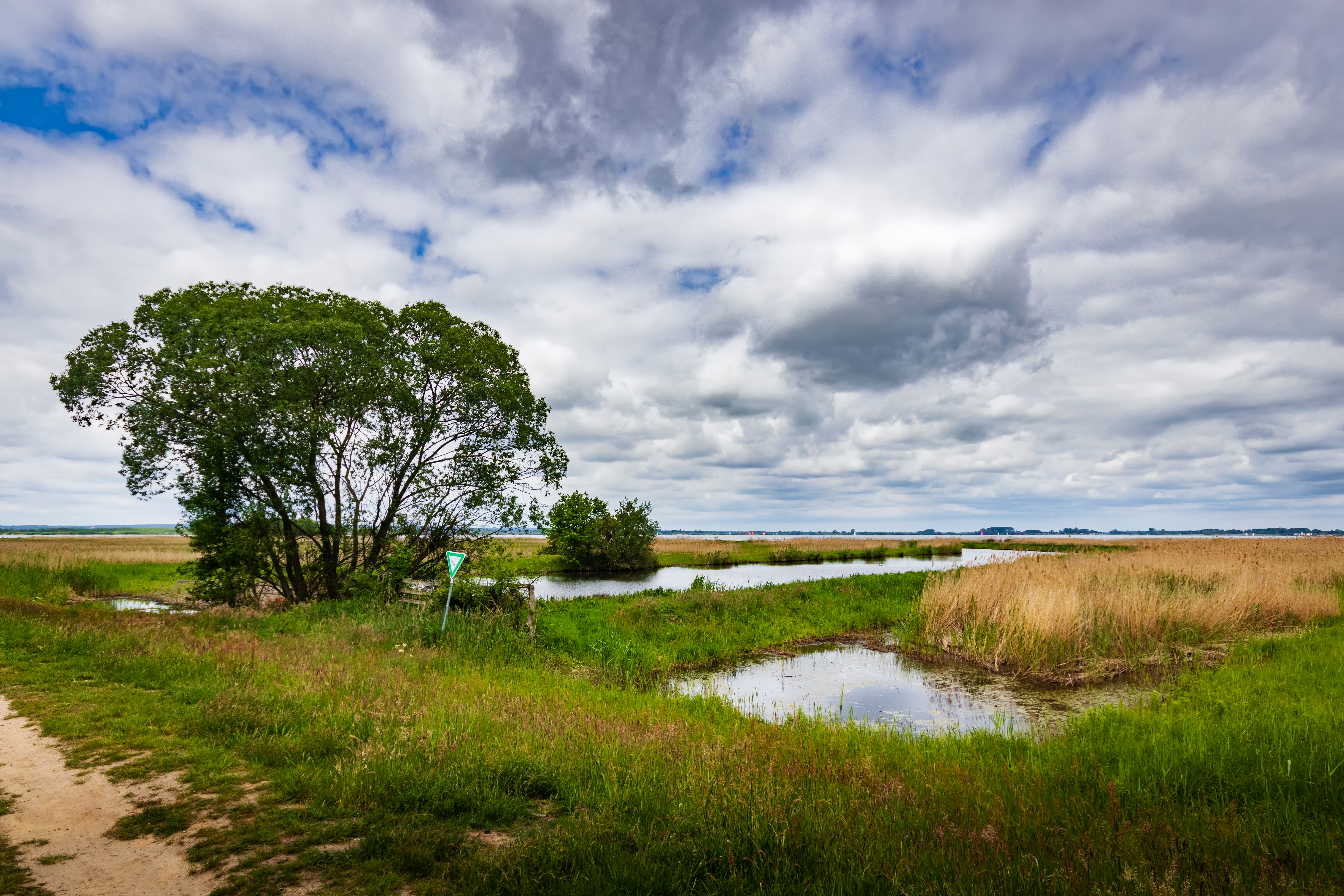 Naturpark Dümmer bei Hüde